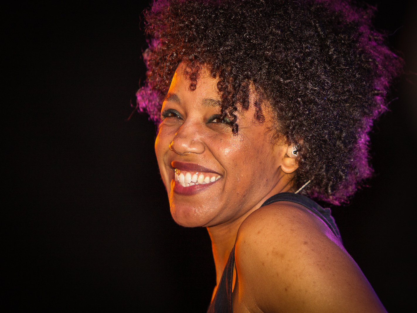 Fola Dada bei einem Konzert mit der Band Hattler in der Alten Molkerei in Bocholt.